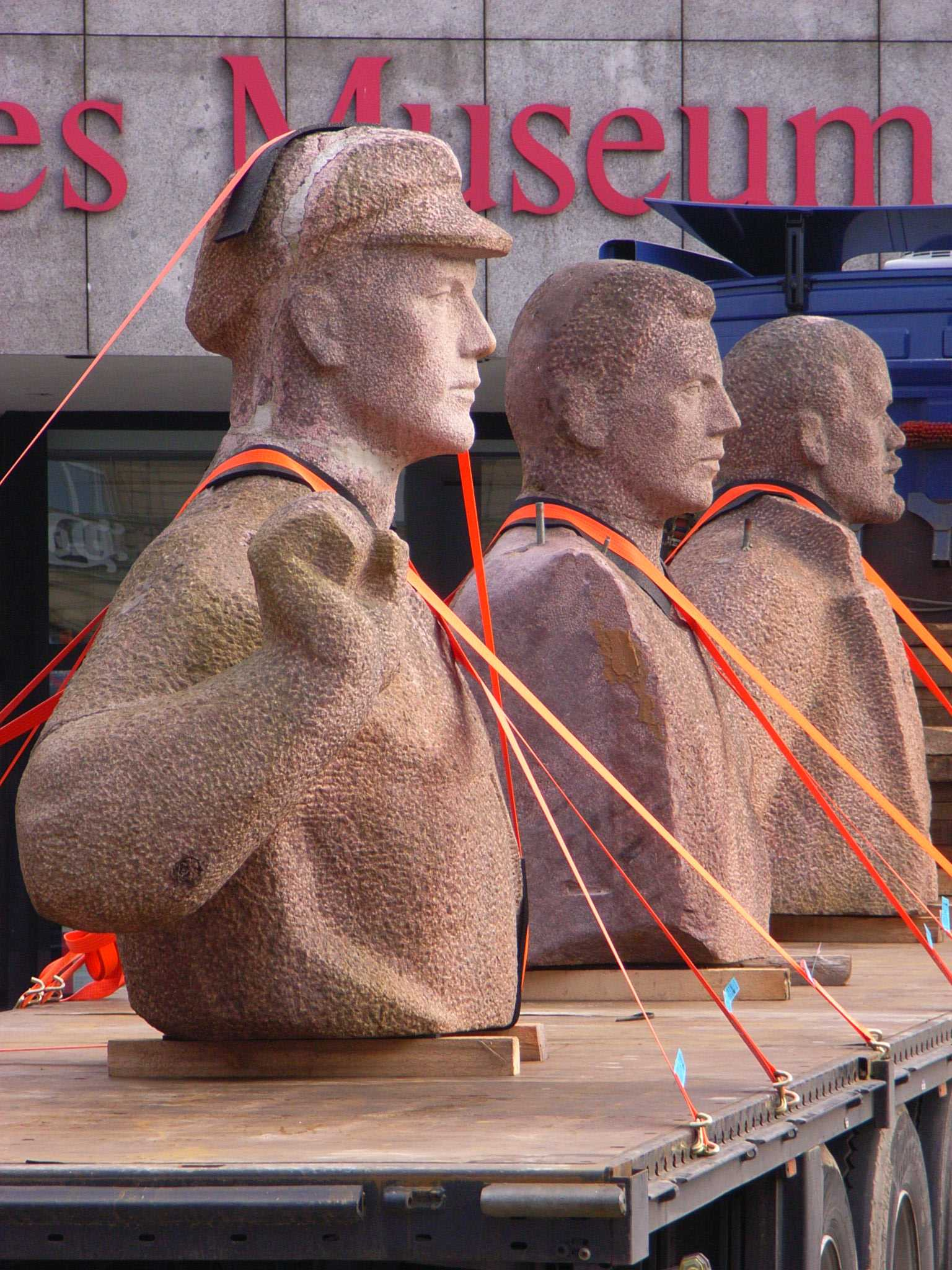 Lenin on Tour, Kunstaktion von Rudolf Herz, Köln 2009